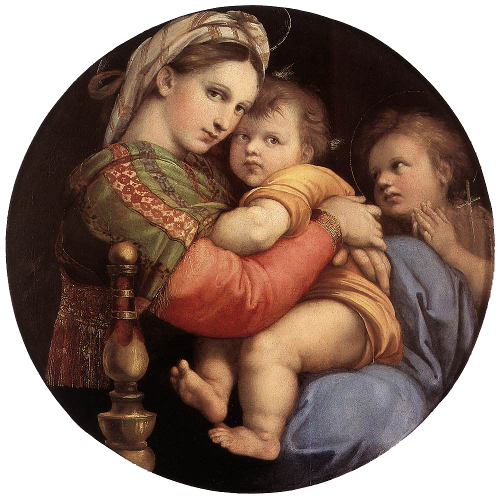 RAFFAELLO Sanzio Madonna della Seggiola (Sedia) Oil on wood, diameter 71 cm Galleria Palatina (Palazzo Pitti), Florence